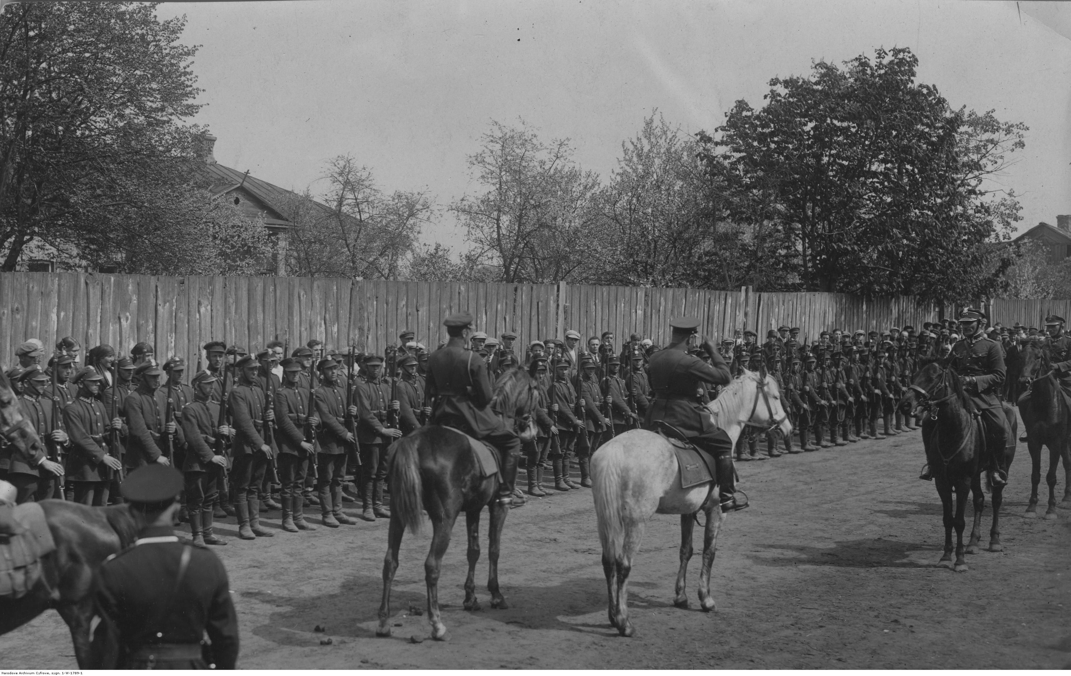 Święto żołnierza polskiego w 17 Batalionie Korpusu Ochrony Pogranicza "Dawidgródek". Raport oddziałów w dniu święta. Ilustrowany Kurier Codzienny - Archiwum Ilustracji.